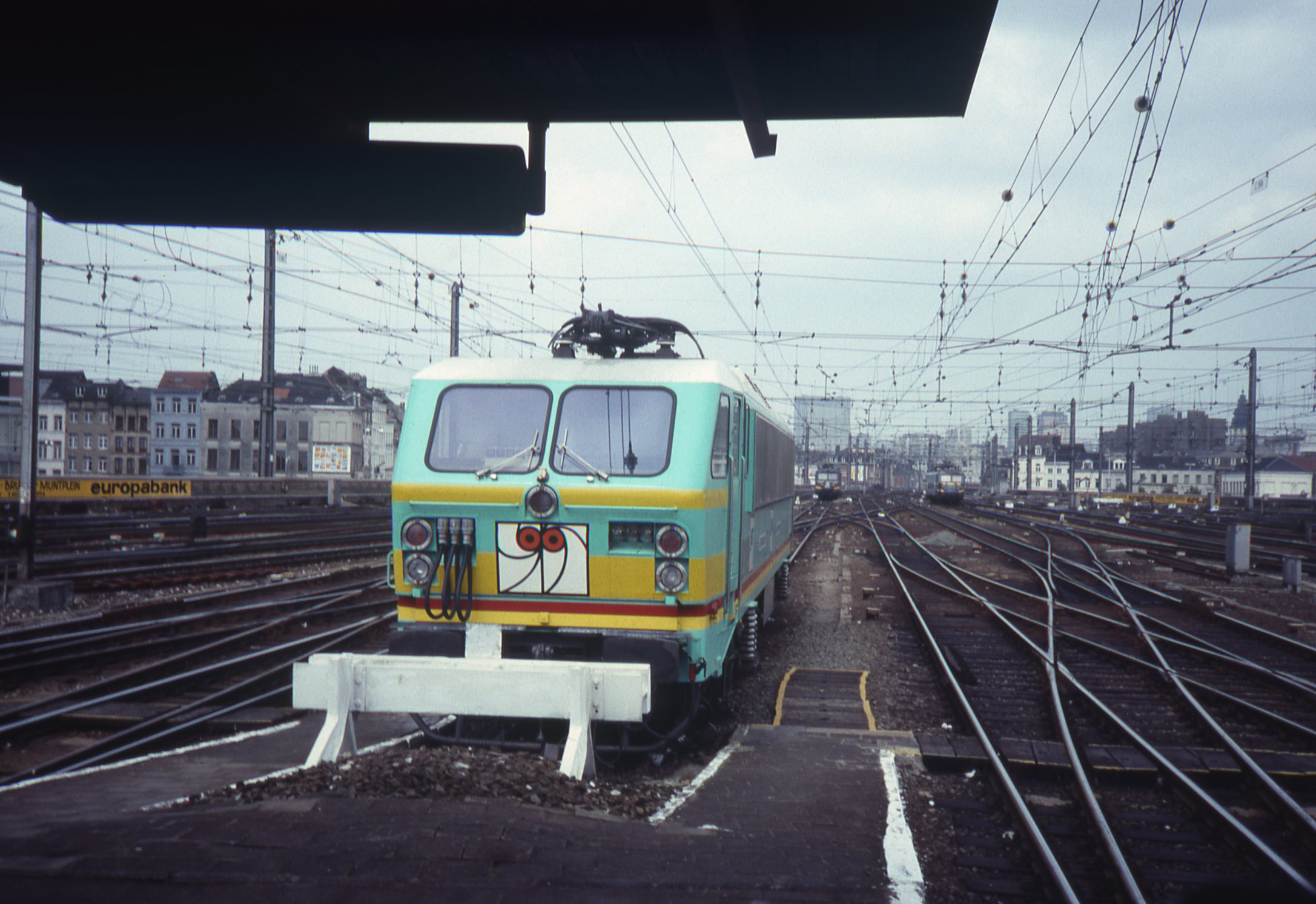 Brussel Zuid aan de Noordkant. Deze 2109 loc heeft de Technorame kleuren en motief.